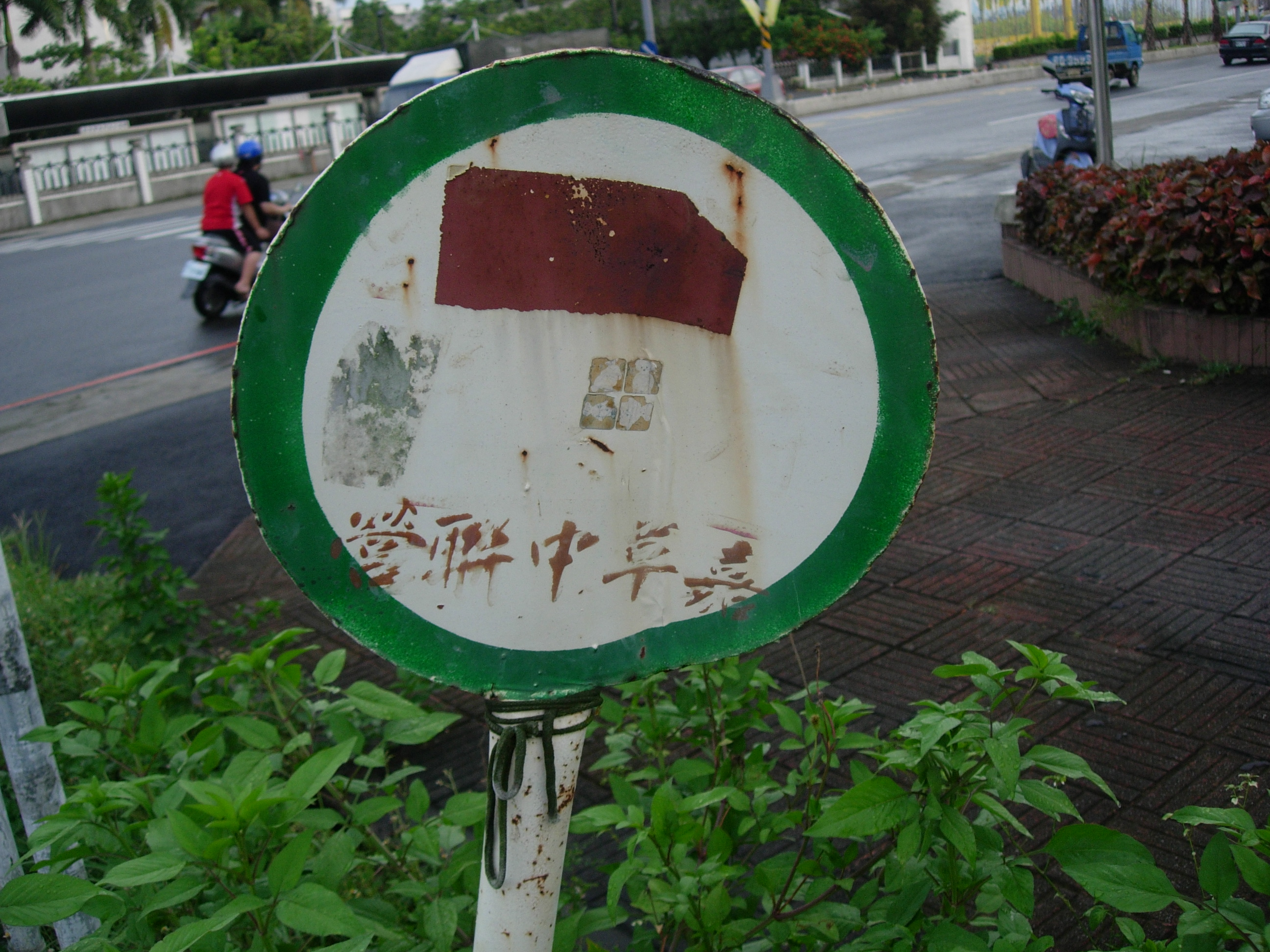 中文（台灣）: 南投地方法院前嘉草中聯營站牌。